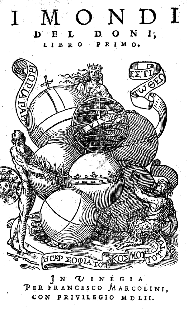 Frontespizio del libro I mondi (1552) di Anton Francesco Doni (1513 – 1574).